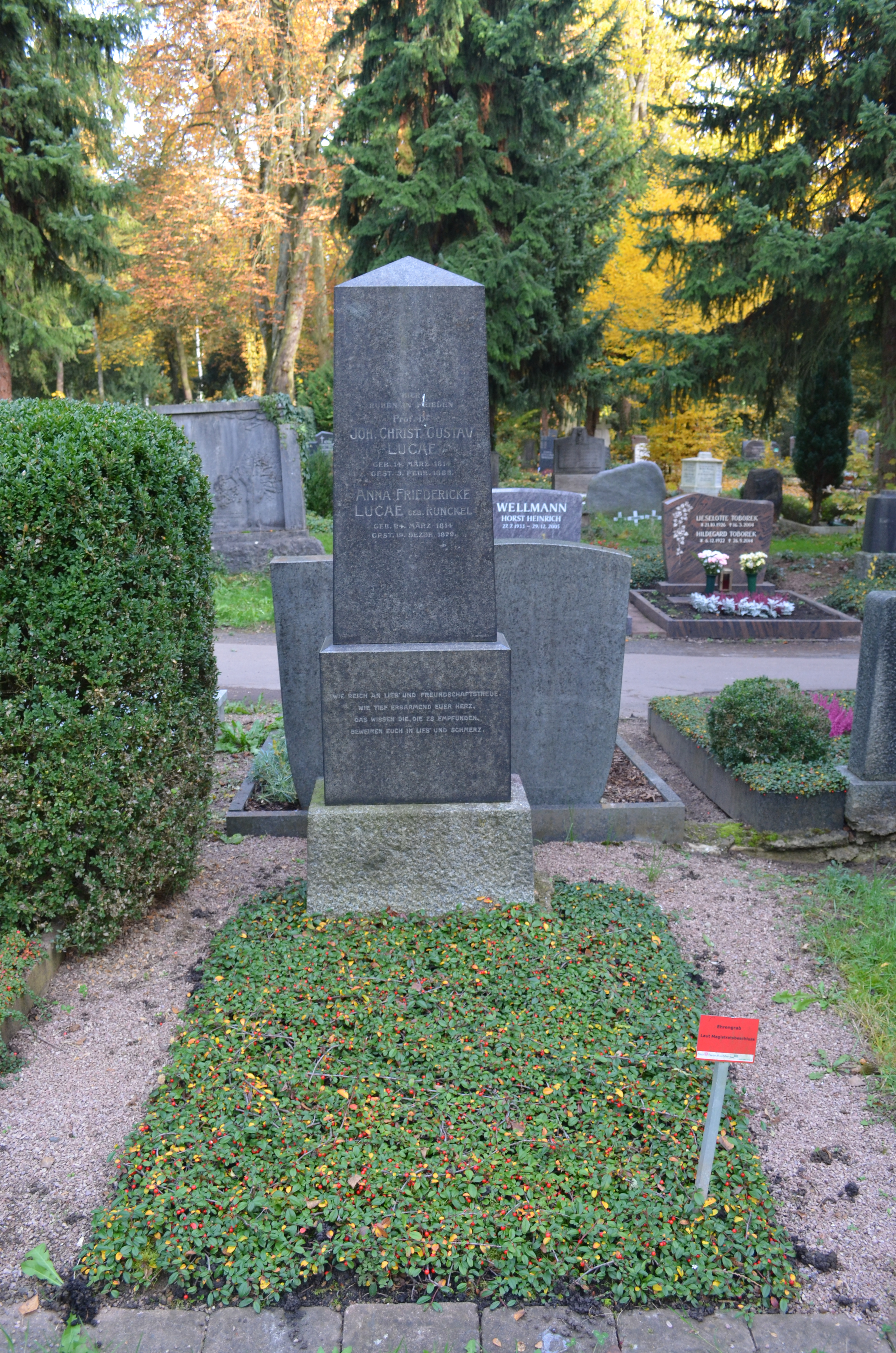 Frankfurt, Hauptfriedhof, Ehrengrab F 677 Johann Christian Gustav Lucae